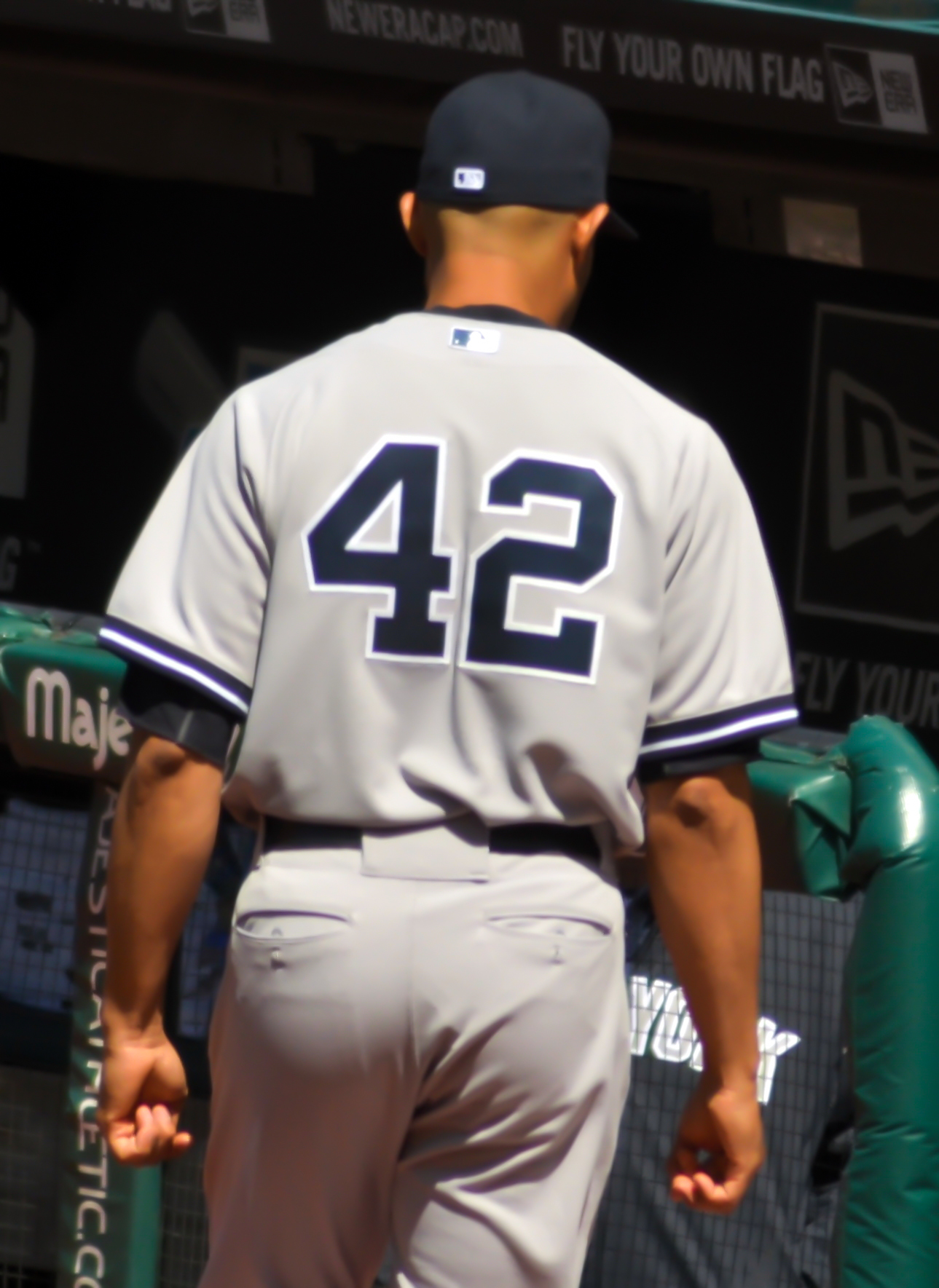 Mariano Rivera